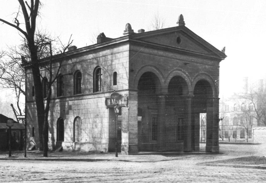 Foto Steuerhaus Charlottenburger Brücke